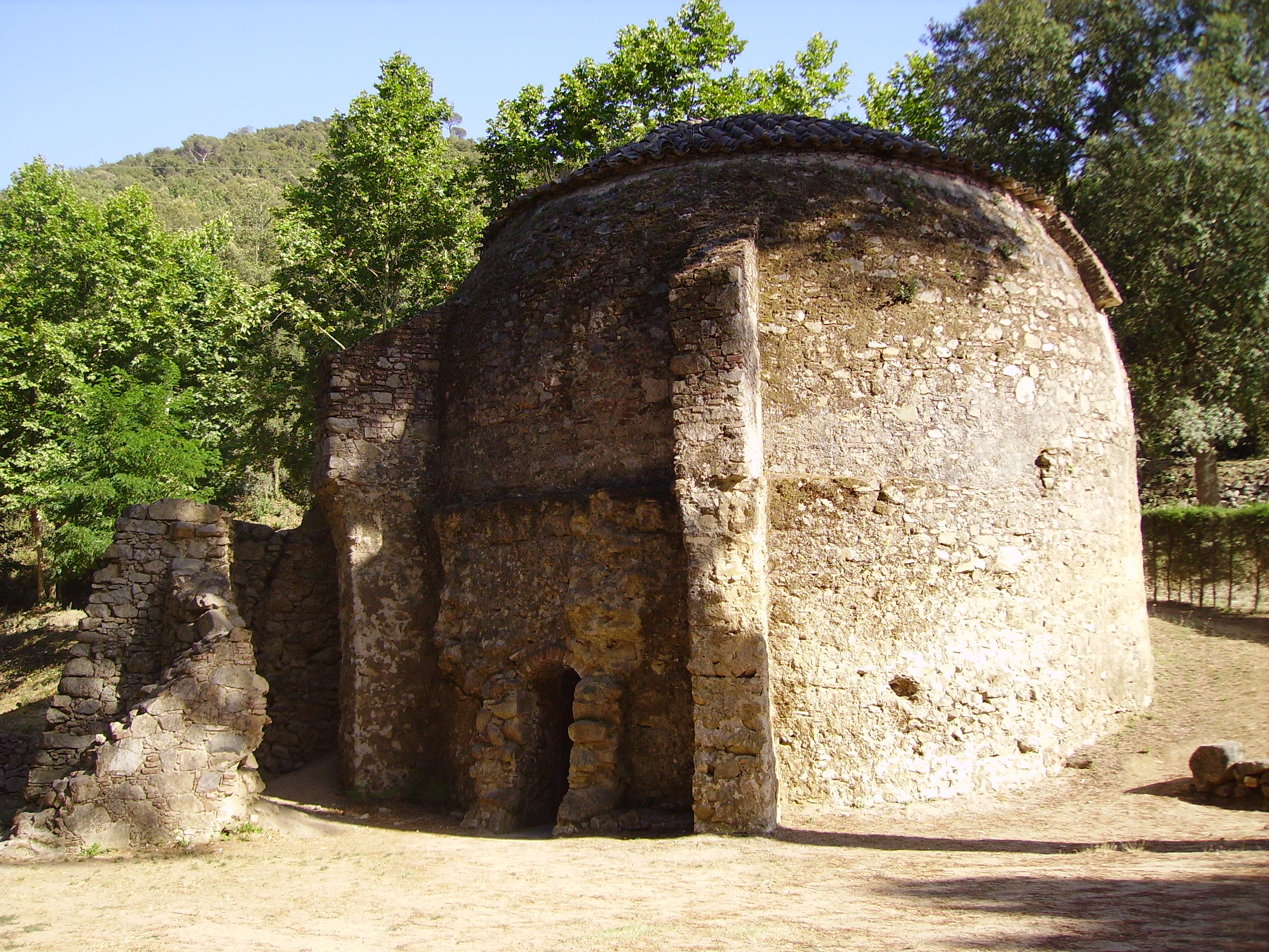 Pou de Glaç a Canyamars